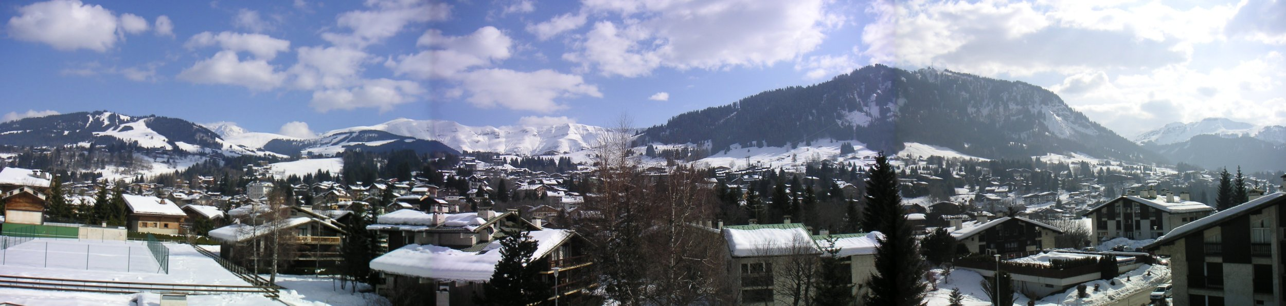 Description: Panorama view over Megève (France - Rhône-Alpes - Haute-Savoie), taken from "Riante colline" Source: Photograph taken by Boly, February 2006 Description: Vue panoramique de Megève (France - Rhône-Alpes - Haute-Savoie),prise depuis la résidence "Riante Colline" Source: Photo prise par Boly, février 2006